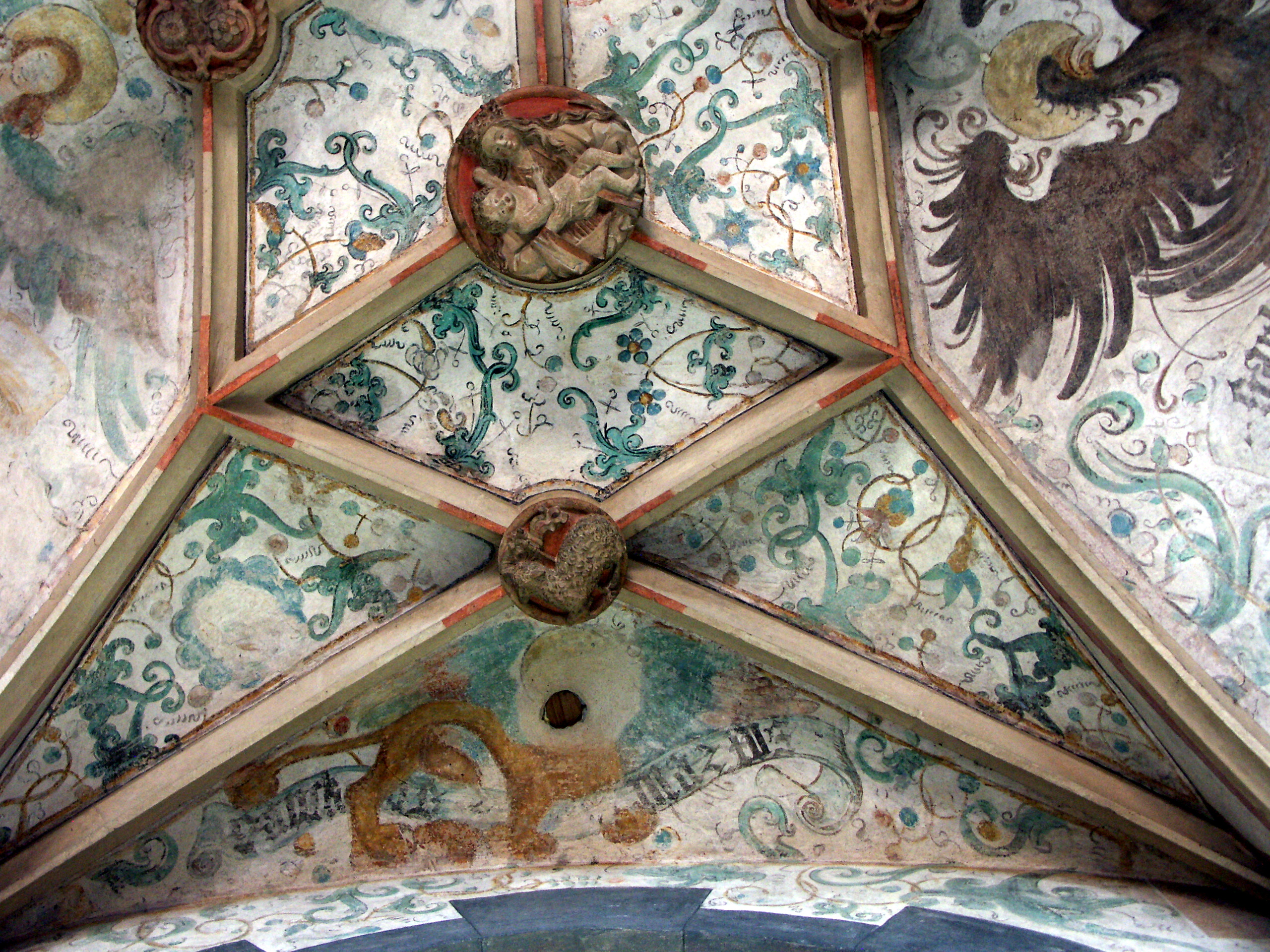 St. Pankratius Burkheim Kaiserstuhl Detail der Kirchendecke